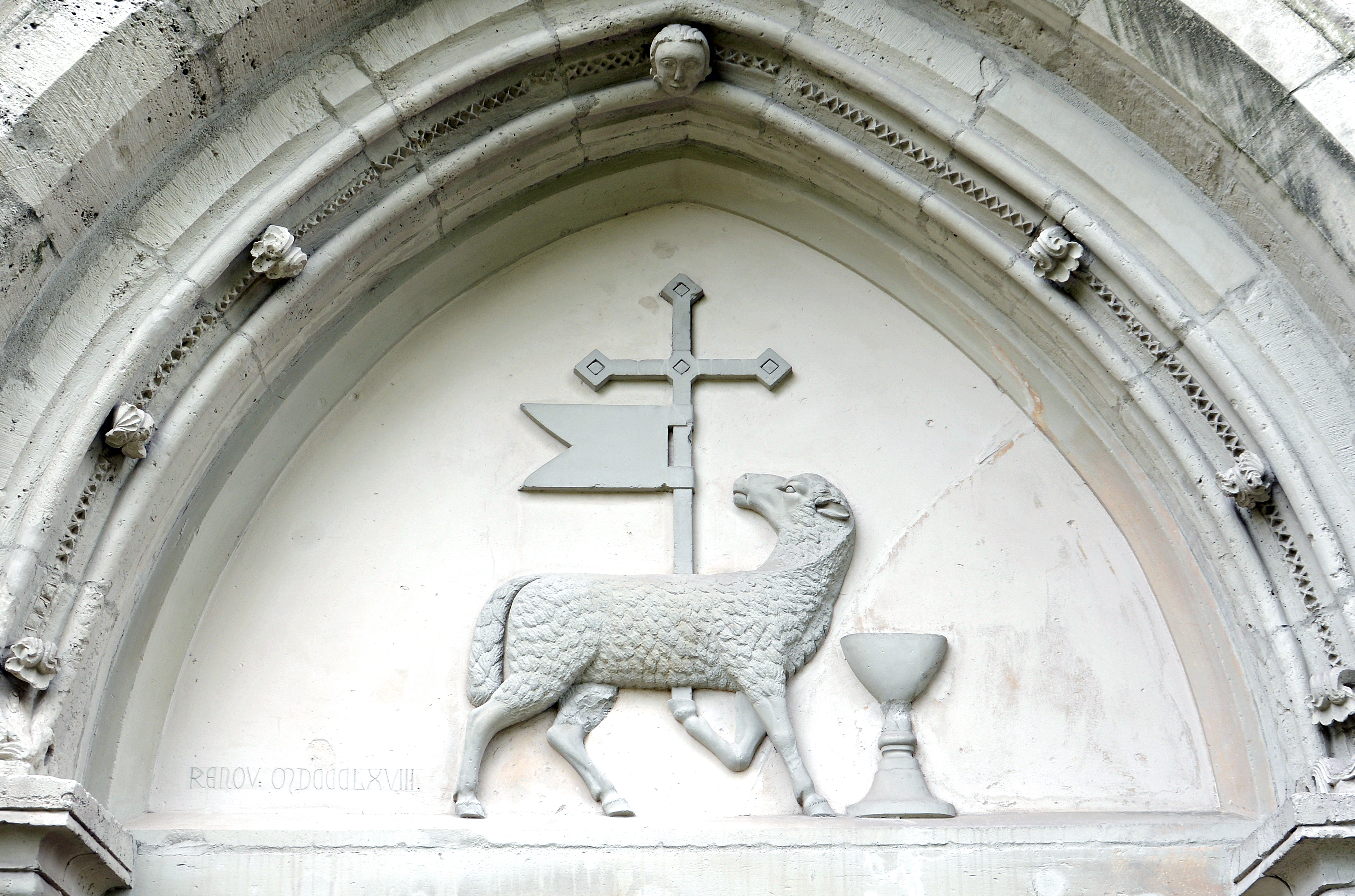 Darstellung des Lamm Gottes an der Andreaskirche zu Braunschweig